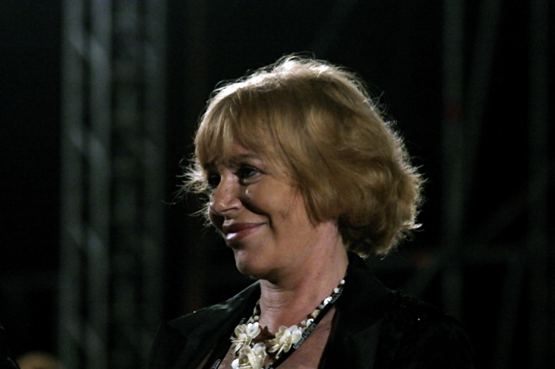 ph: Alberto Macaluso